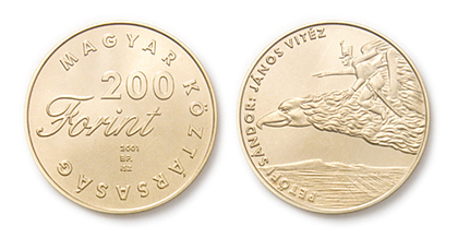 Petőfi Sándor: János Vitéz, A magyar ifjúsági irodalom alakjai emlékpénzérme sor, rézötvözet, vert, 2001., Tervező: ifj. Szlávics László, Kibocsátó: Magyar Nemzeti Bank